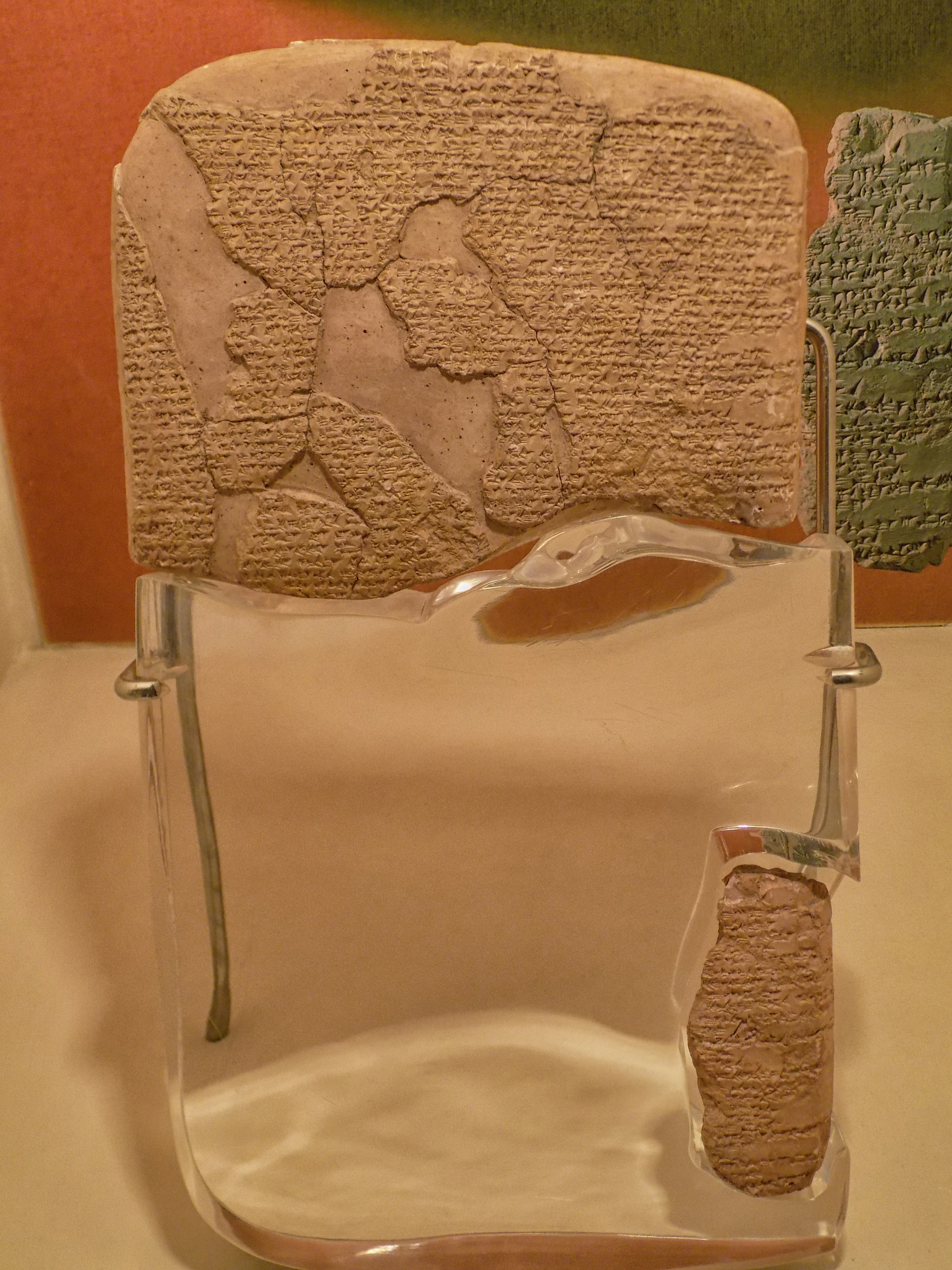 Eski Şark Eserleri Müzesinde sergilenmekte olan Kadeş Antlaşması.